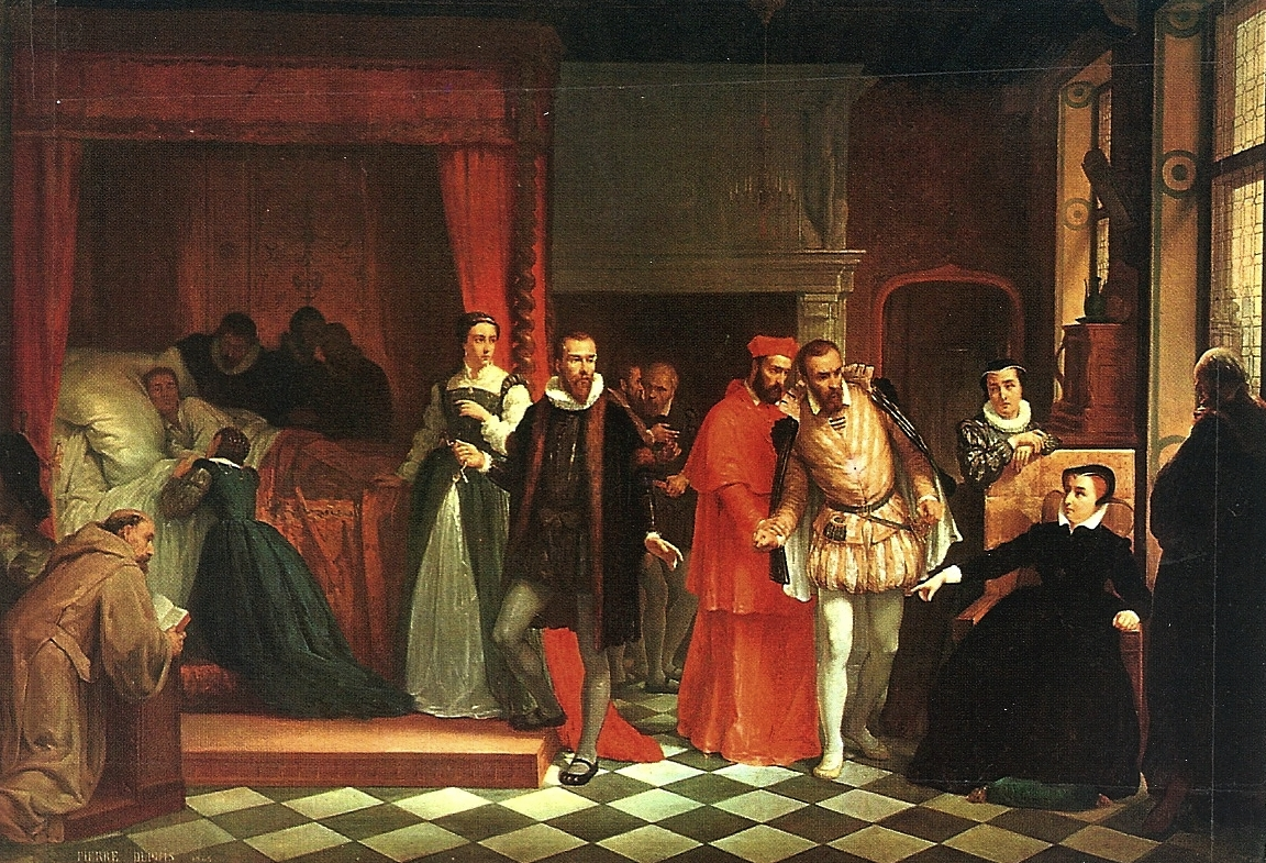 La mort du roi de France François II à Orléans, décembre 1560, hôtel Groslot, Orléans, France, Modified from File:Jacques_Guillemeau_-_François_II.jpg